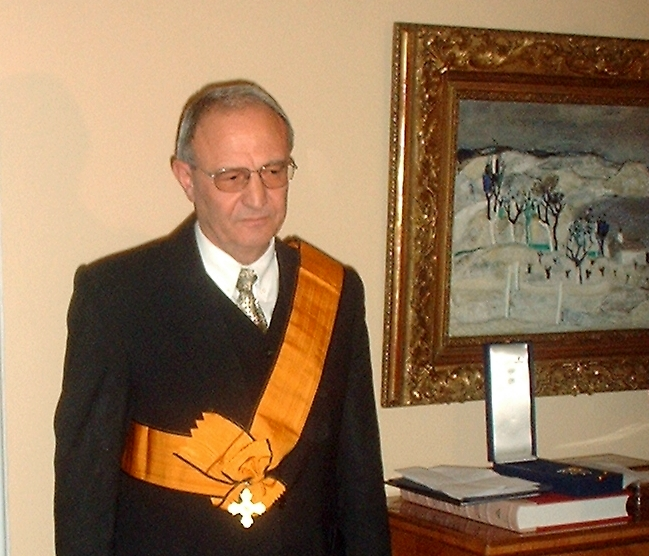 Описание на файла: Проф. Кирил Топалов - носител на Големия кръст на ордена на Феникс, връчен му от посланик Михаил Христидис (01.10.2002 г.) от името на президента на Република Гърция Константинос Стефанопулос за изключителните му заслуги за развитието на българо-гръцките отношения в периода 1998 - 2002 г. Източник на файла: собствено произведение. Дата на публикуване на файла: 24.12.2007 г. Име на автора: Светлозар Жеков GFDL: Свободно разпространение; при промяна лицензът се запазва